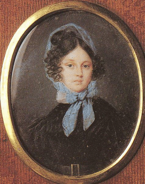 Якушкина (Шереметьева) Анастасия Васильевна, жена Ивана Дмитриевича Якушкина